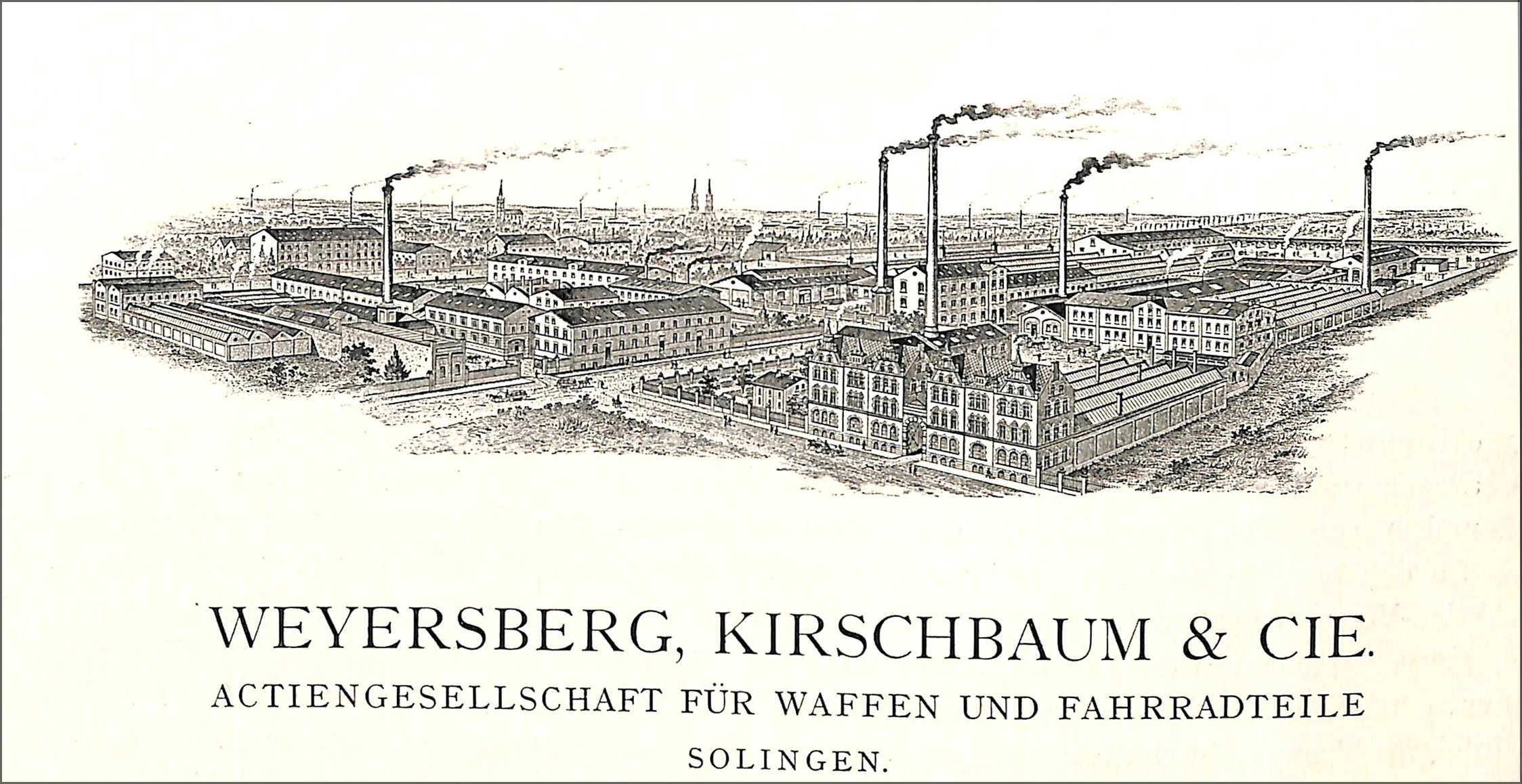 Solingen - (fiktive) Ansicht der Weyersberg, Kirschbaum u. Co AG